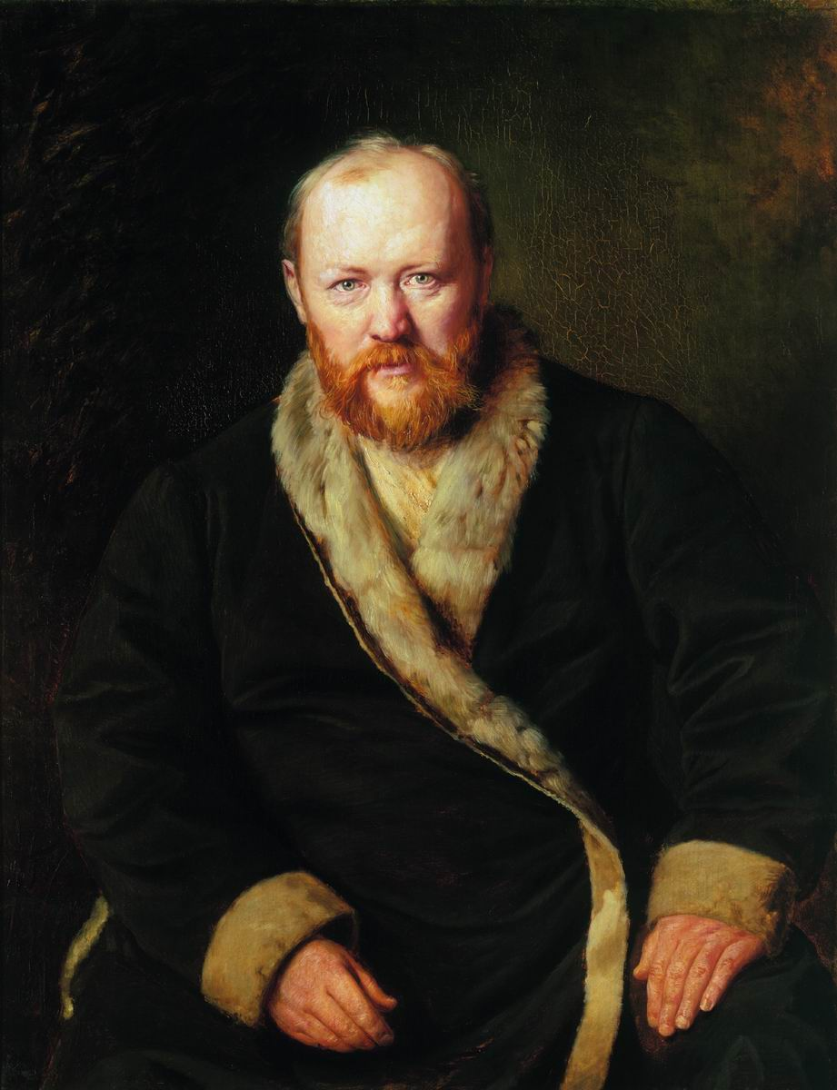 Портрет драматурга А.Н. Островского